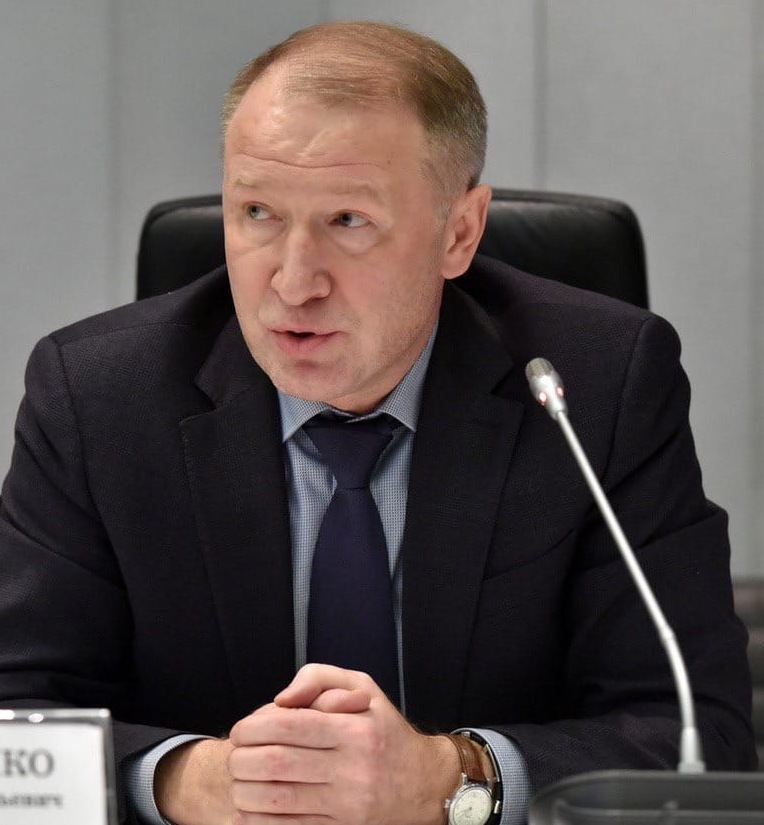 Александр Ананченко на заседании Правительства ДНР